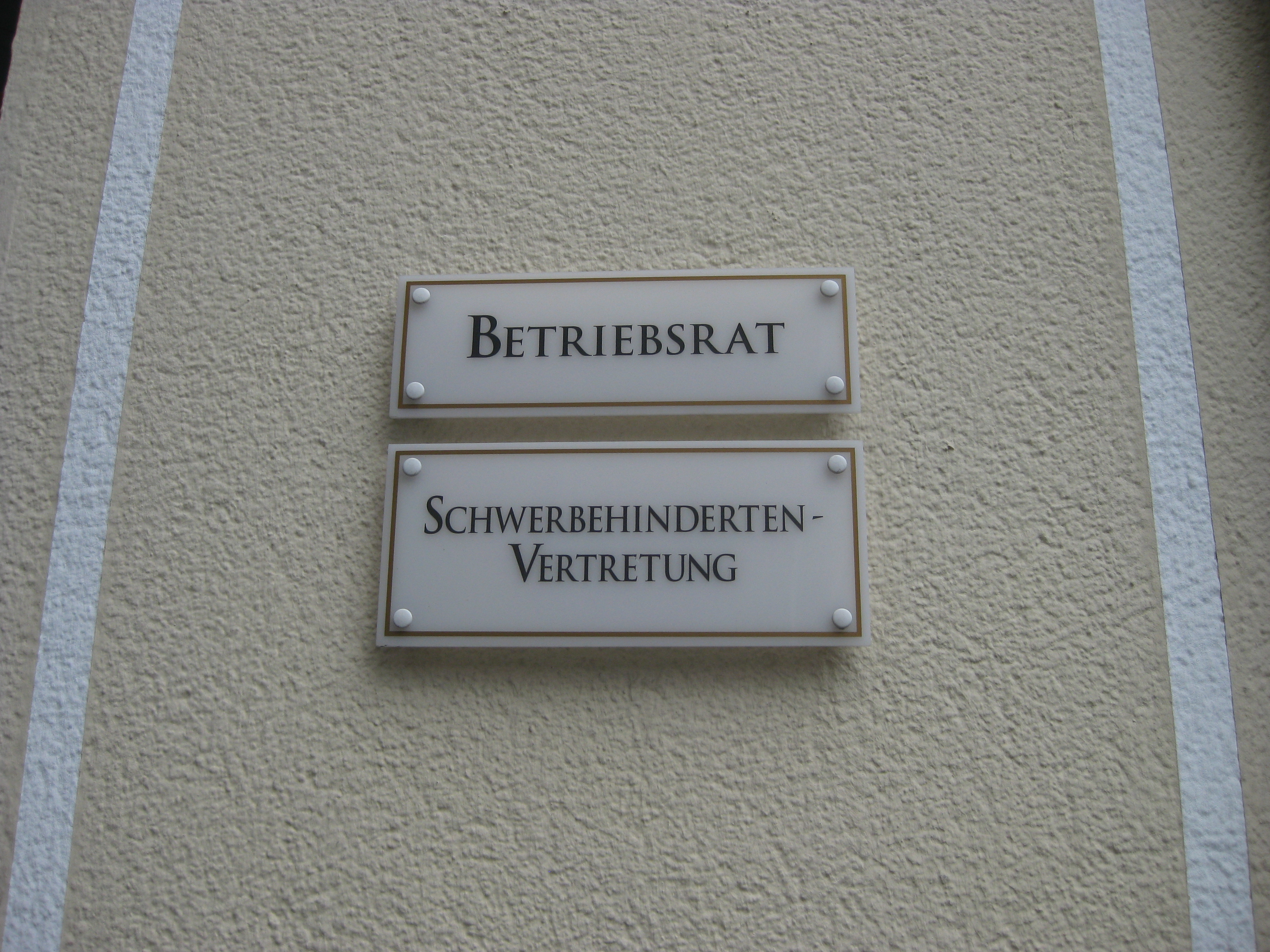 Schilder für Betriebsrat und Schwerbehindertenvertretung, Brauerei Museum Dortmund.